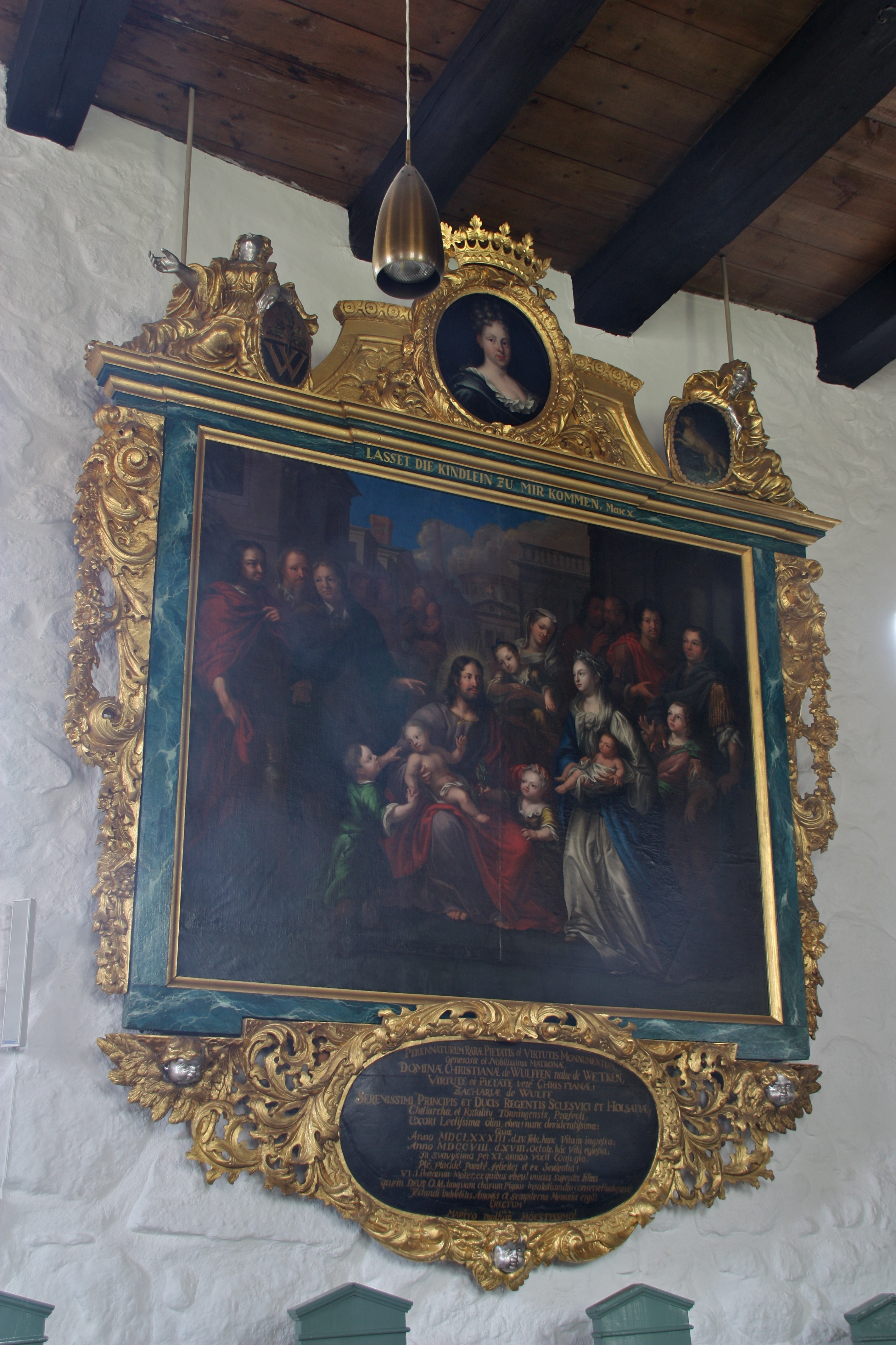 Dithmarschen, Tellingstedt, Kirche St. Martin, Epitaph